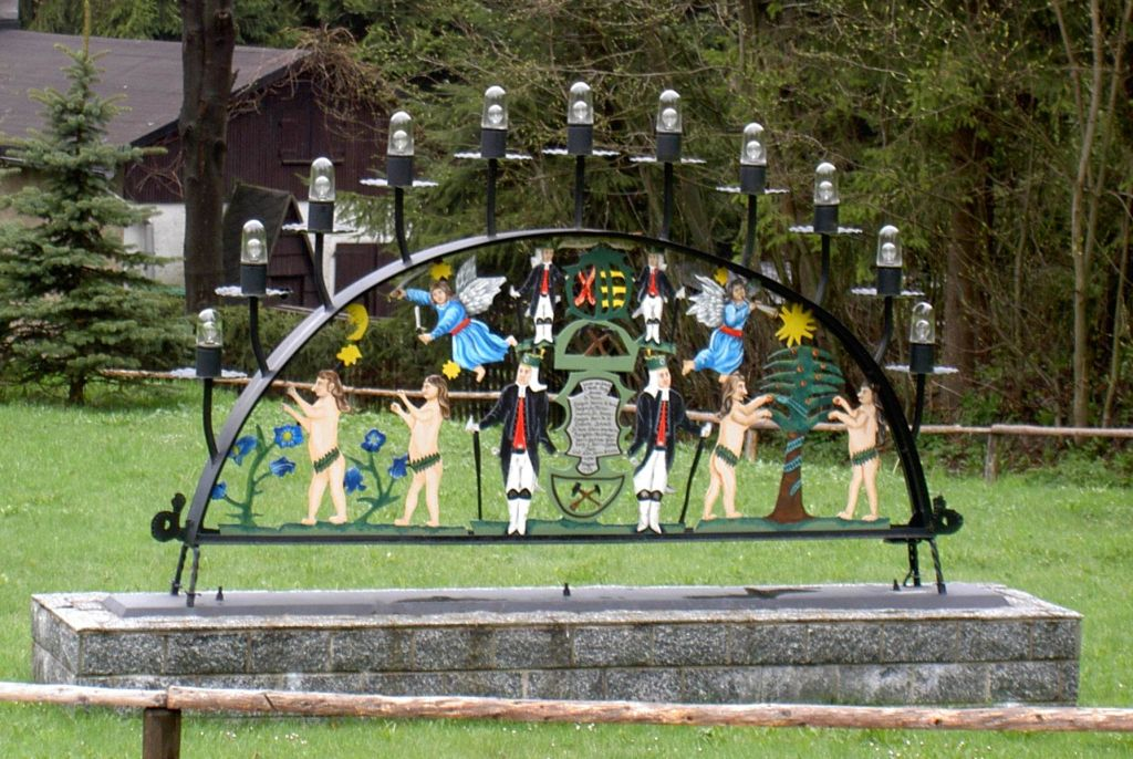 Schwibbogen am Pferdegöpel in Johanngeorgenstadt.